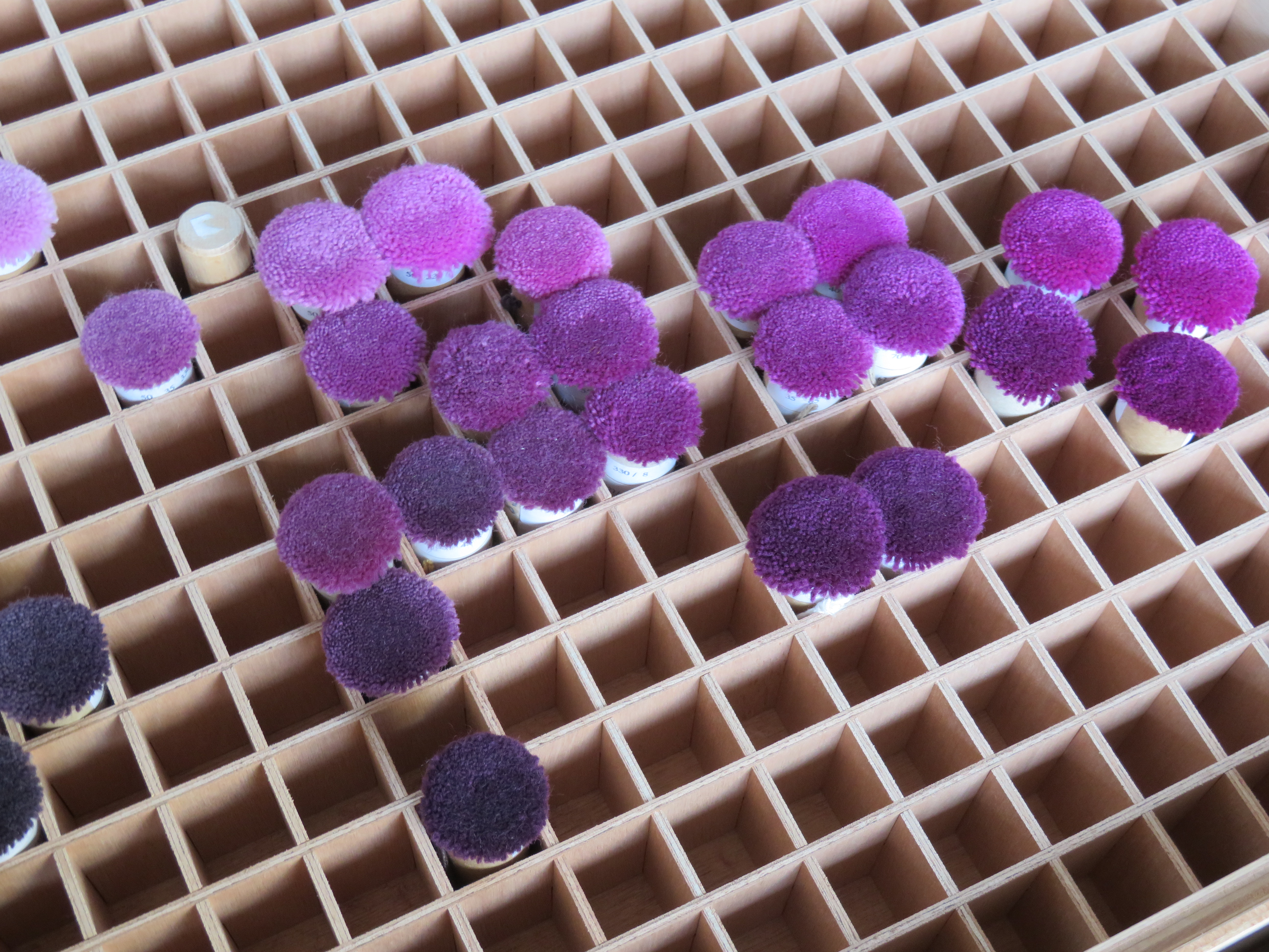 Pompons violets, nuancier pour la manufacture de la Savonnerie.